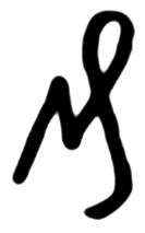 Nichtdarstellbares Unicodezeichen "Pfennig" erstellt mit Gimp und gucharmap 1.2.0 U+20B0 GERMAN PENNY SIGN Allgemeine Zeicheneigenschaften Unicode-Kategorie: Symbol, Währung Verschiedene, nützliche Darstellungsweisen UTF-8: 0xE2 0x82 0xB0 Oktal terminiertes UTF-8: \342\202\260 Dezimale Entitätsreferenz: ₰